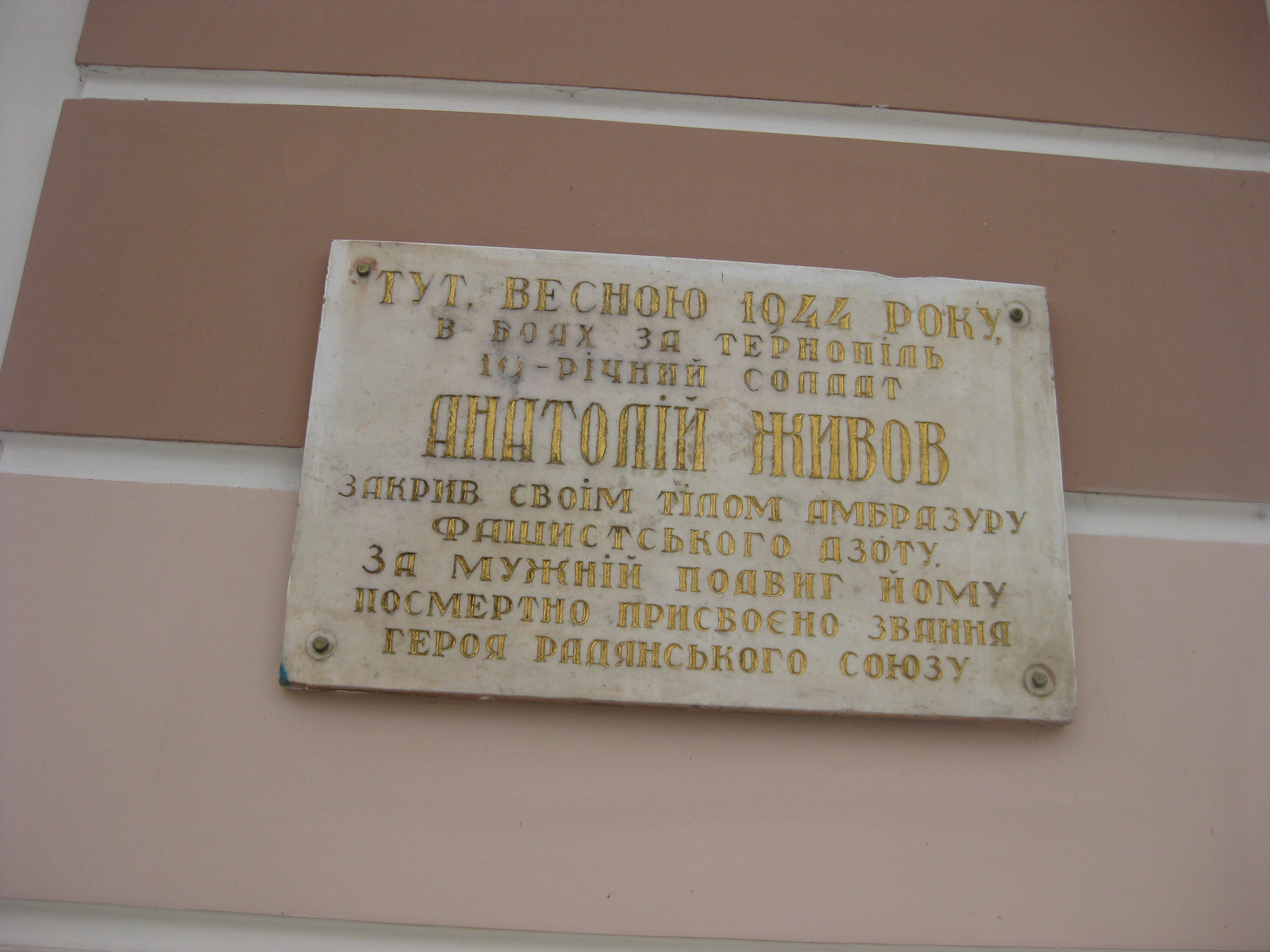 Пам'ятне місце подвигу Героя Радянського Союзу Живова А. П., Тернопіль, бульвар Т. Шевченка Меморіальна дошка